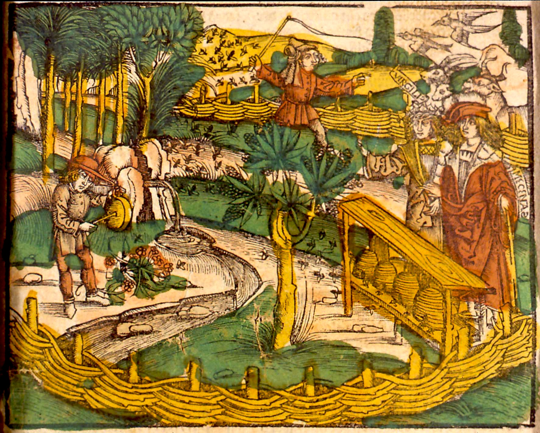 Medicinarius - Das Buch der Gesundheit Liber de arte distillandi Simplicia et Composita. Das nüw buch der rechten kunst zu distillieren. Von Marsilio ficino und anderer hochberömpter Artzte natürliche und gute künst zu behalten den gesunden leib und zuvertryben die kranckheit mit erlengerung des lebens, de M. Ficinus. - Strasbourg : J. Grueninger, 1509.